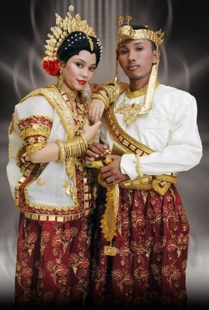 pengantin bugis